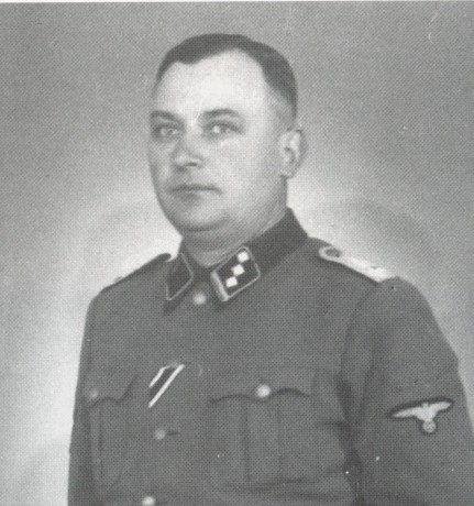 SS Security Lieutenant (SS-Obersturmführer Richard Thomalla)